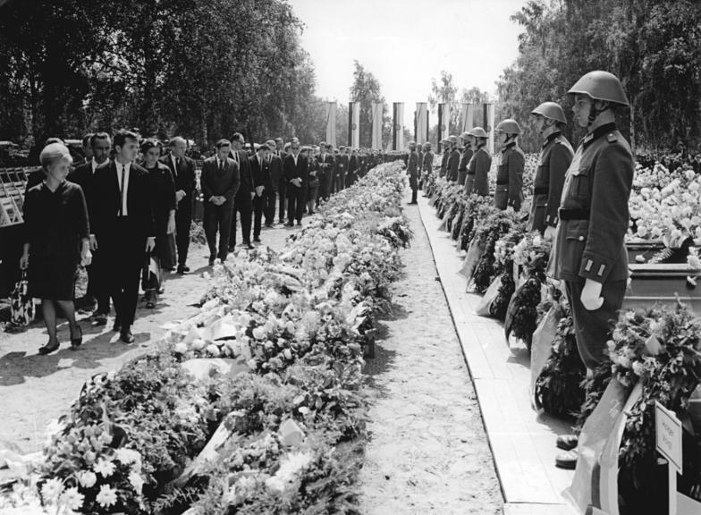 Zentralbild Koard 11.7.1967 Magdeburg: Tief ergriffen verneigt sich die Bevölkerung ... der DDR vor den Toten des tragischen Verkehrsunglücks in Langenweddingen. In der Stunde, da sich auf einer ergreifenden Trauerfeier am 11.7.1967 auf dem Magdeburger West-Friedhof die schwarzumflorten Fahnen senkten, fühlten Millionen Menschen mit dem Schmerz der leidgeprüften Hinterbliebenen.